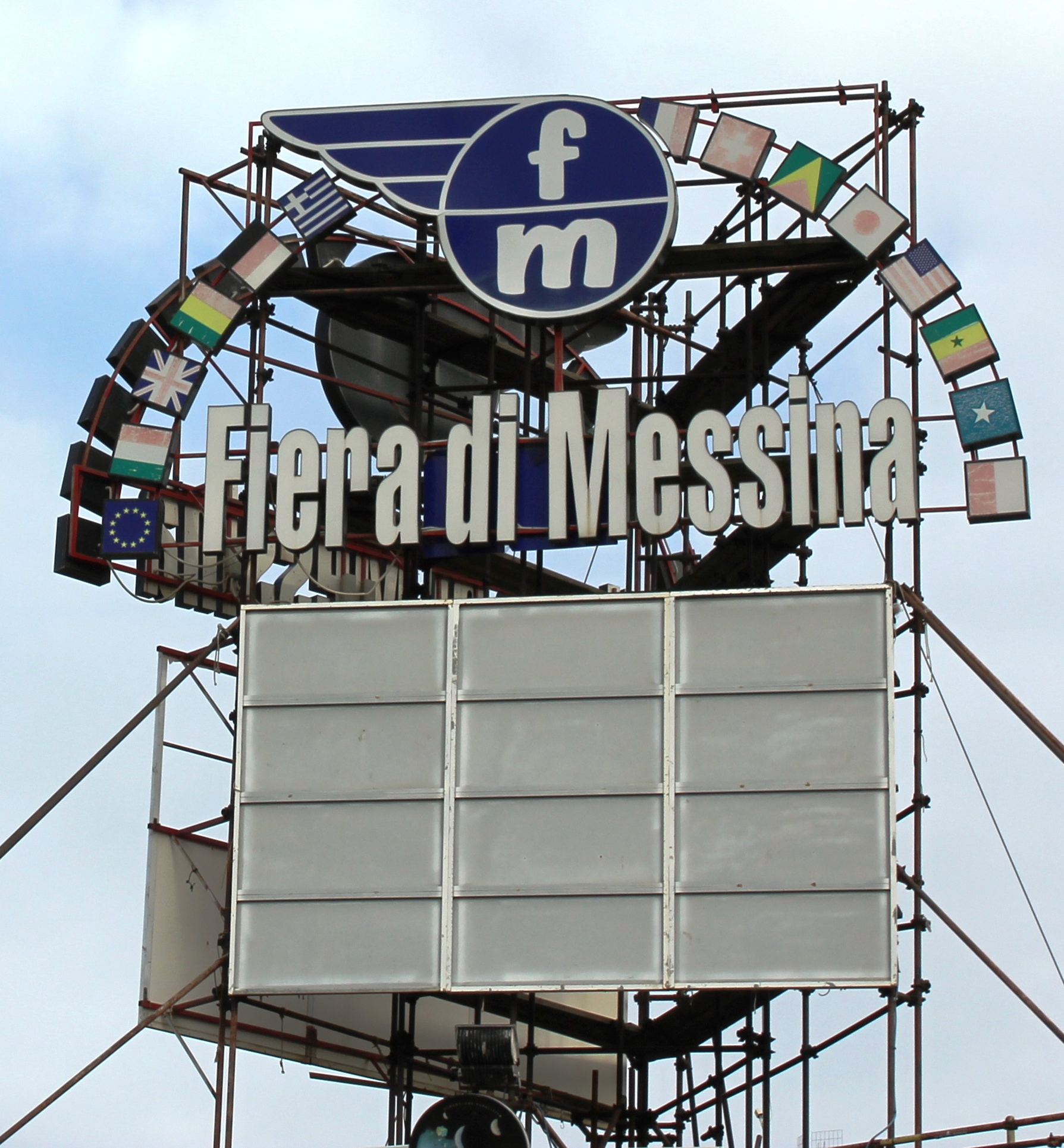 L'insegna posta in alto su una delle pareti che racchiudono lo spazio dove ogni anno viene inaugurata e svolta la fiera di Messina.